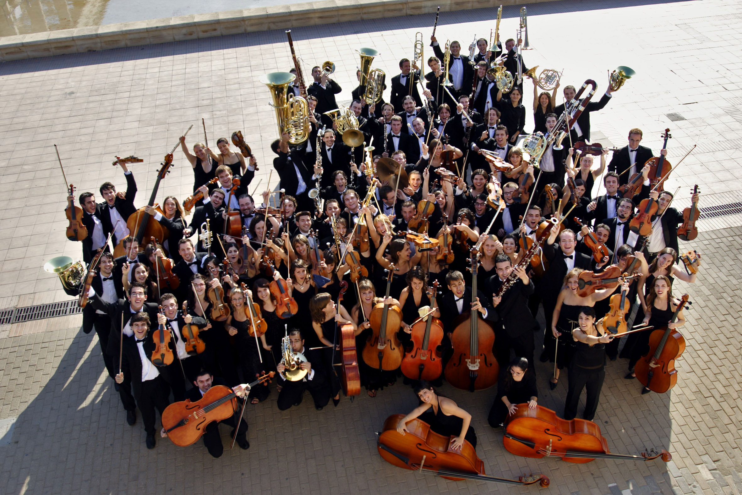 La Jove Orquestra de la Generalitat Valenciana en 2006. Foto Natxo Francés, archivo IVM